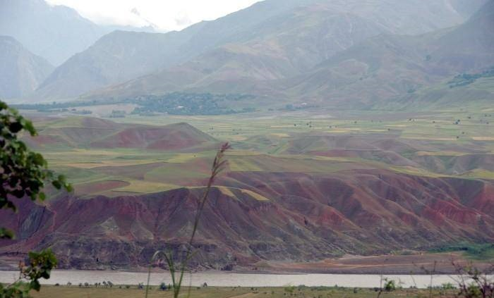 محله کاهدونک شهرستان خواهان